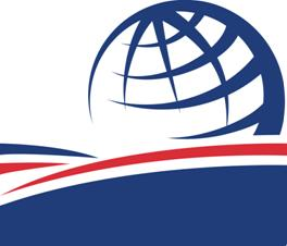 Foreign Agricultural Service